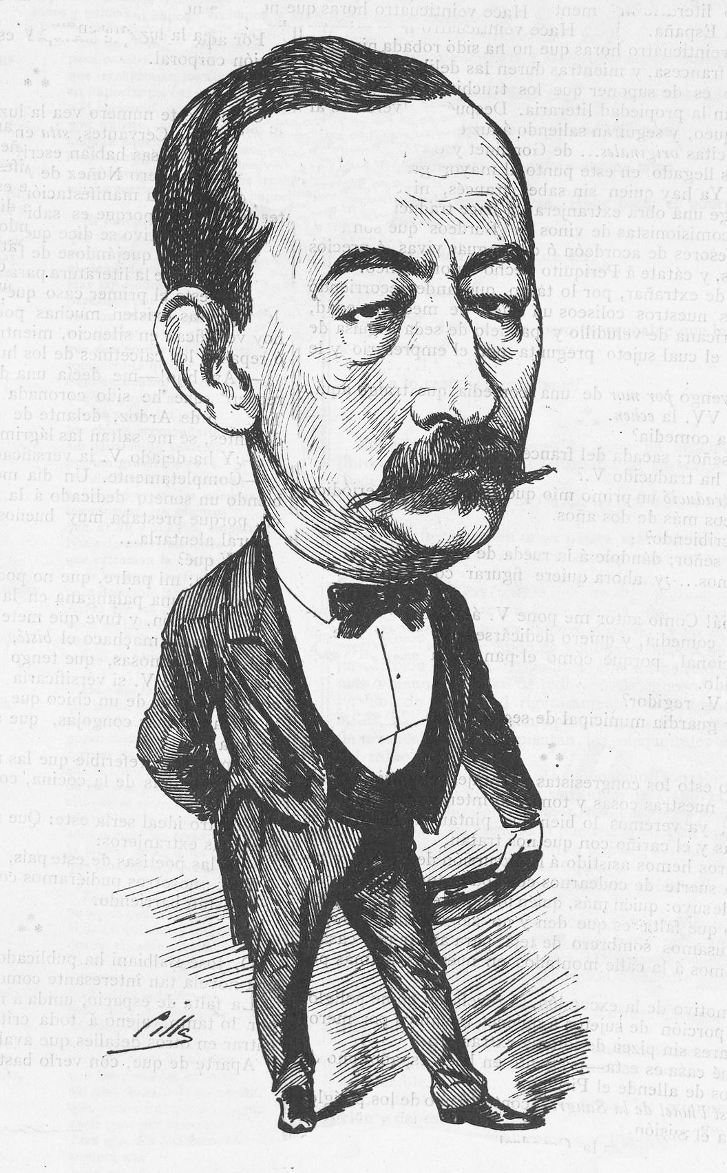 Blas de Loma Corradi.